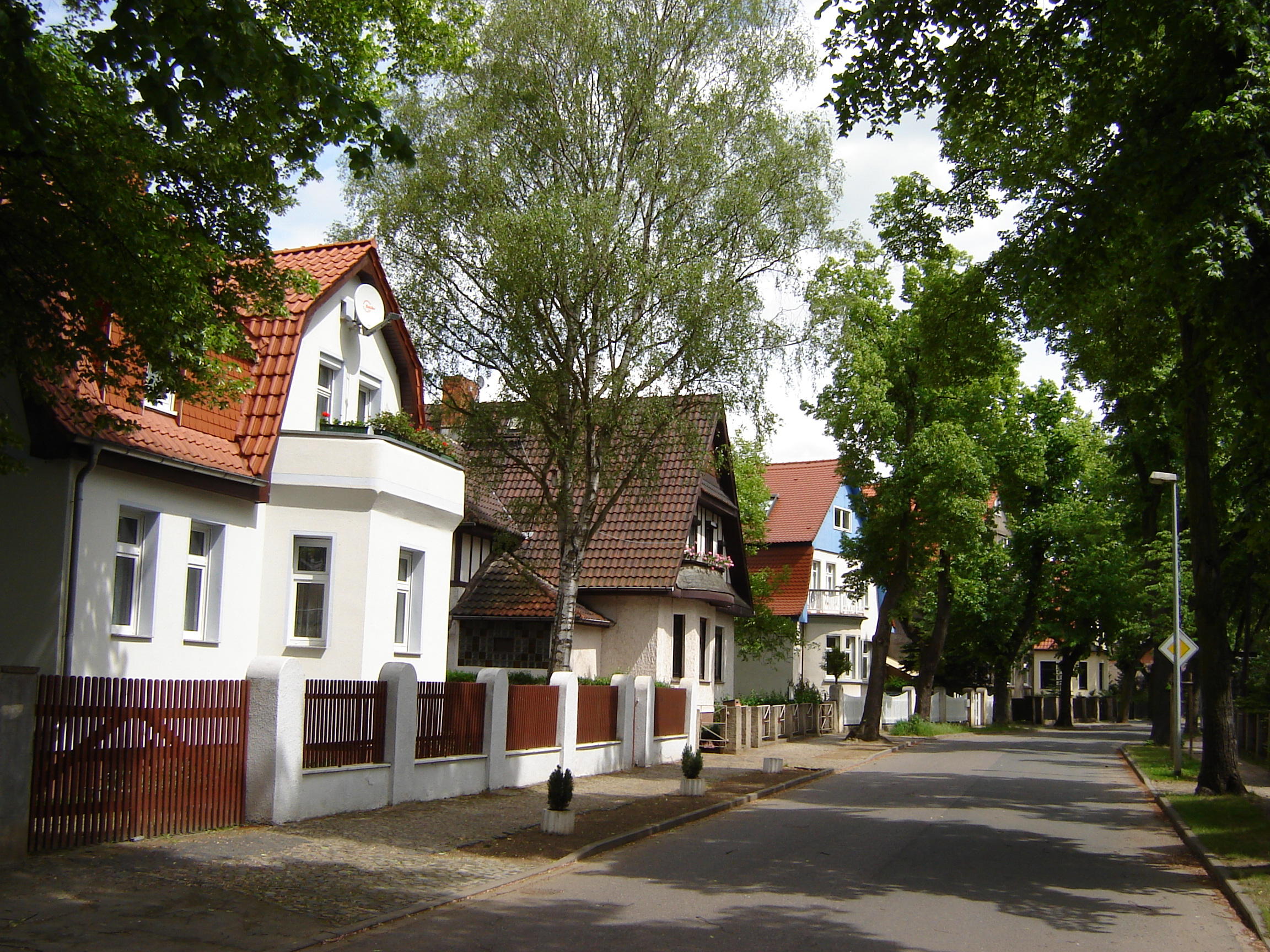 Villenstraße in Biederitz (Sachsen-Anhalt)